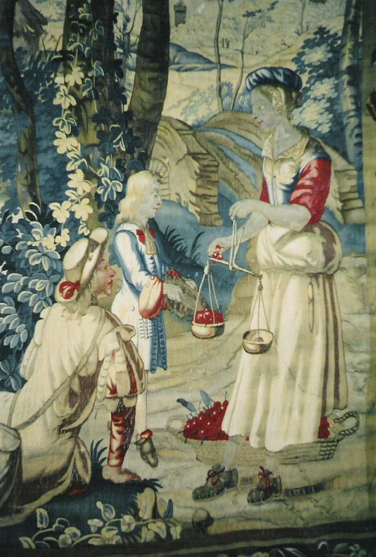 Fransk gobelin på Rosenholm Slot, udført ca. 1700.